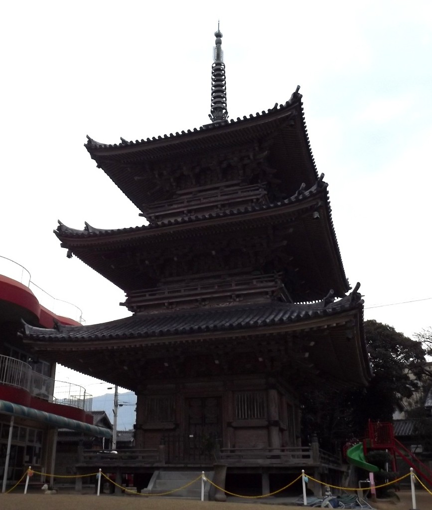 興願寺の三重塔